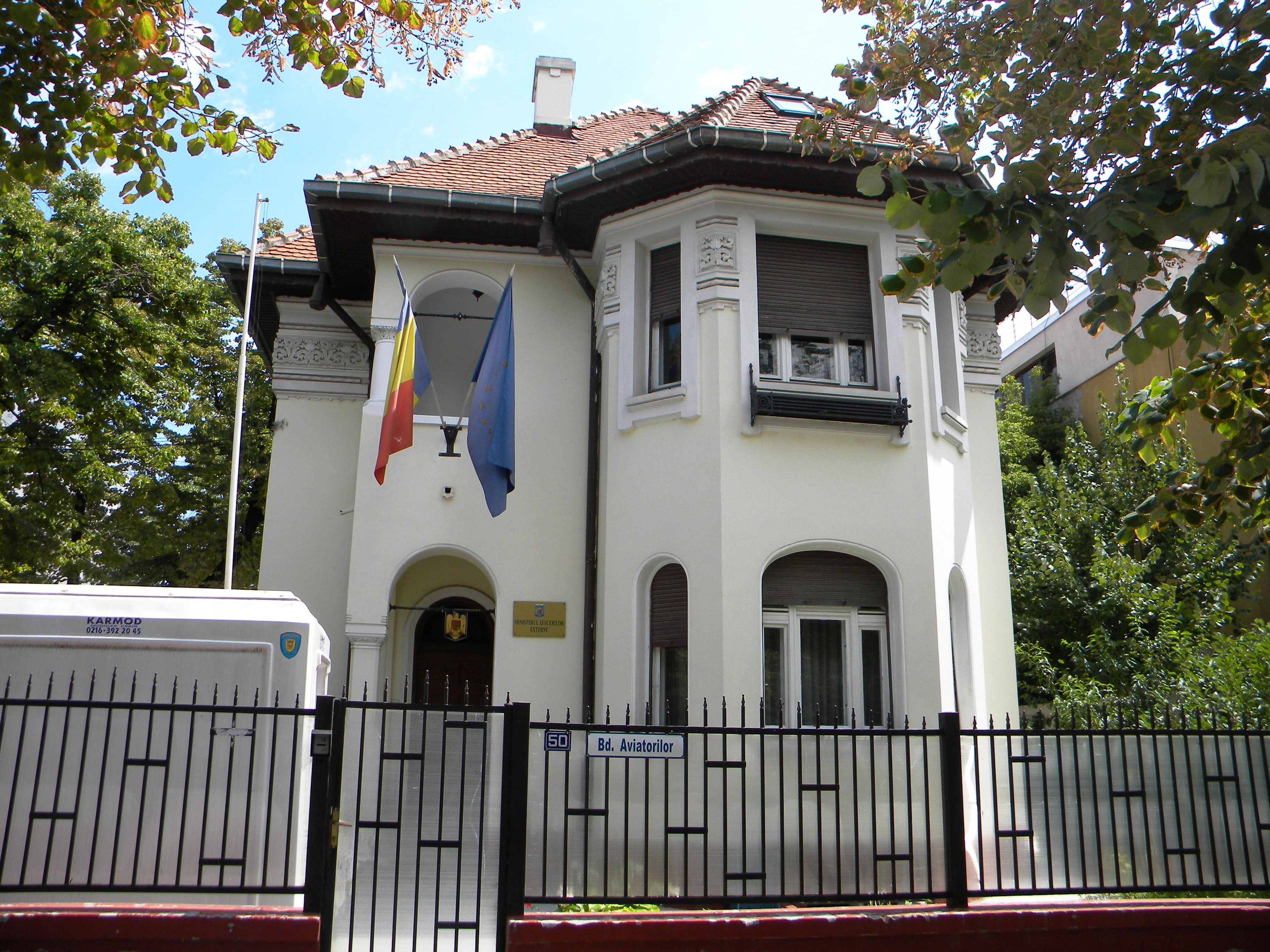 Imobil pe Bd. Aviatorilor, nr. 50, Bucuresti sect. 1